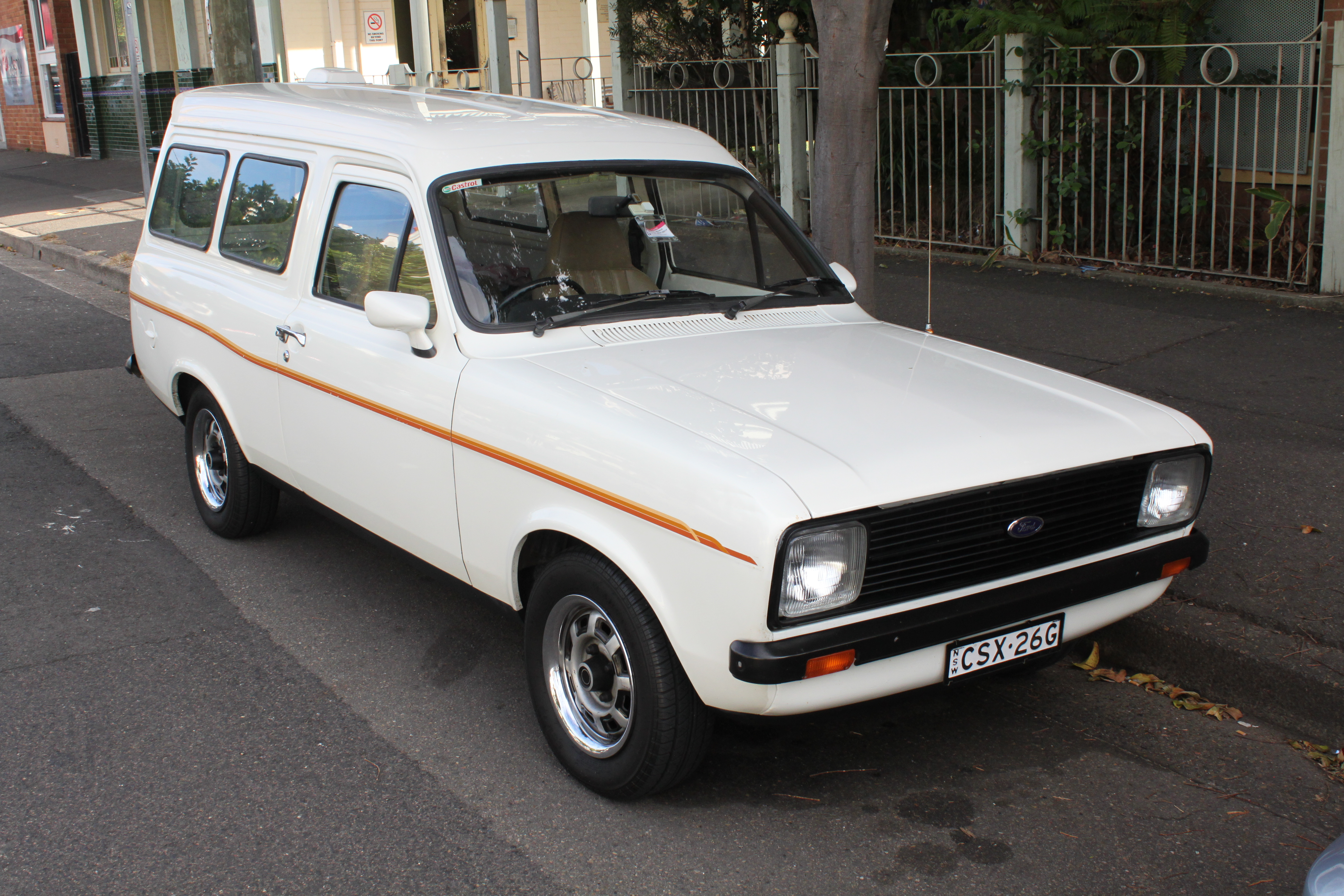 Ford Escort MkII Van